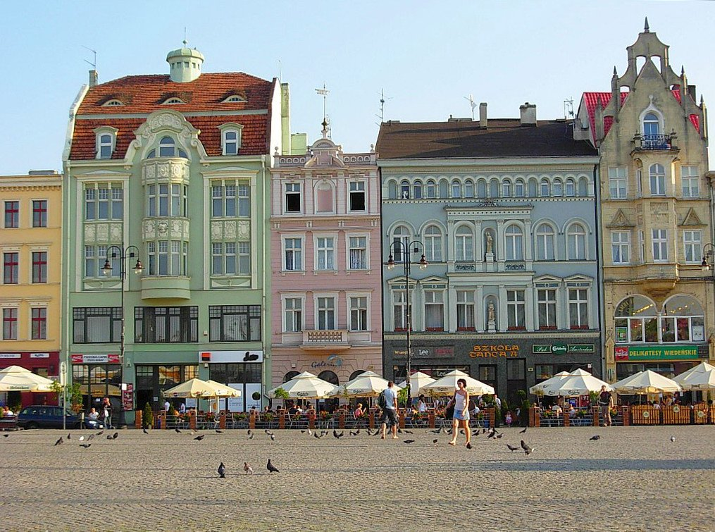 Południowa pierzeja Starego Rynku w Bydgoszczy